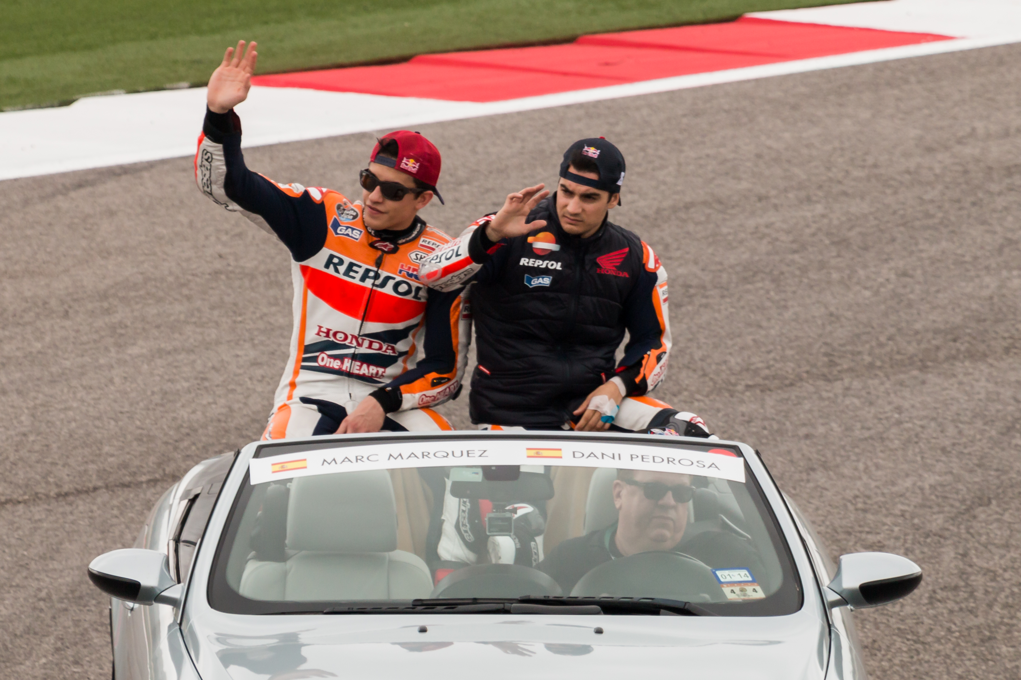 Marquez and Pedrosa